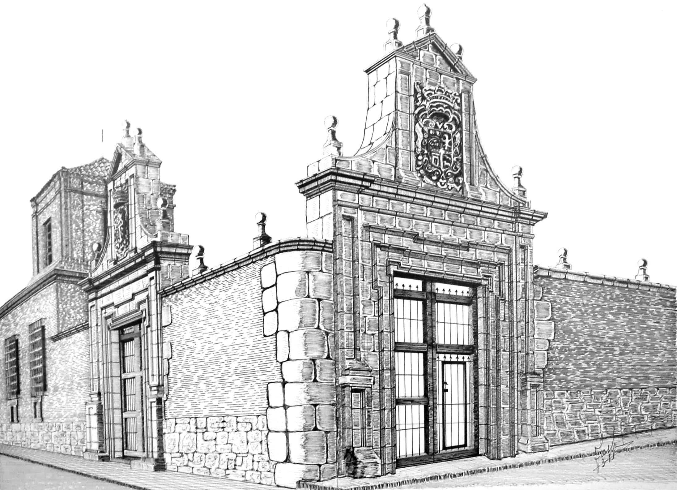 Palacio del Almirante, Medina del Campo (Valladolid, Castilla y León). [1]